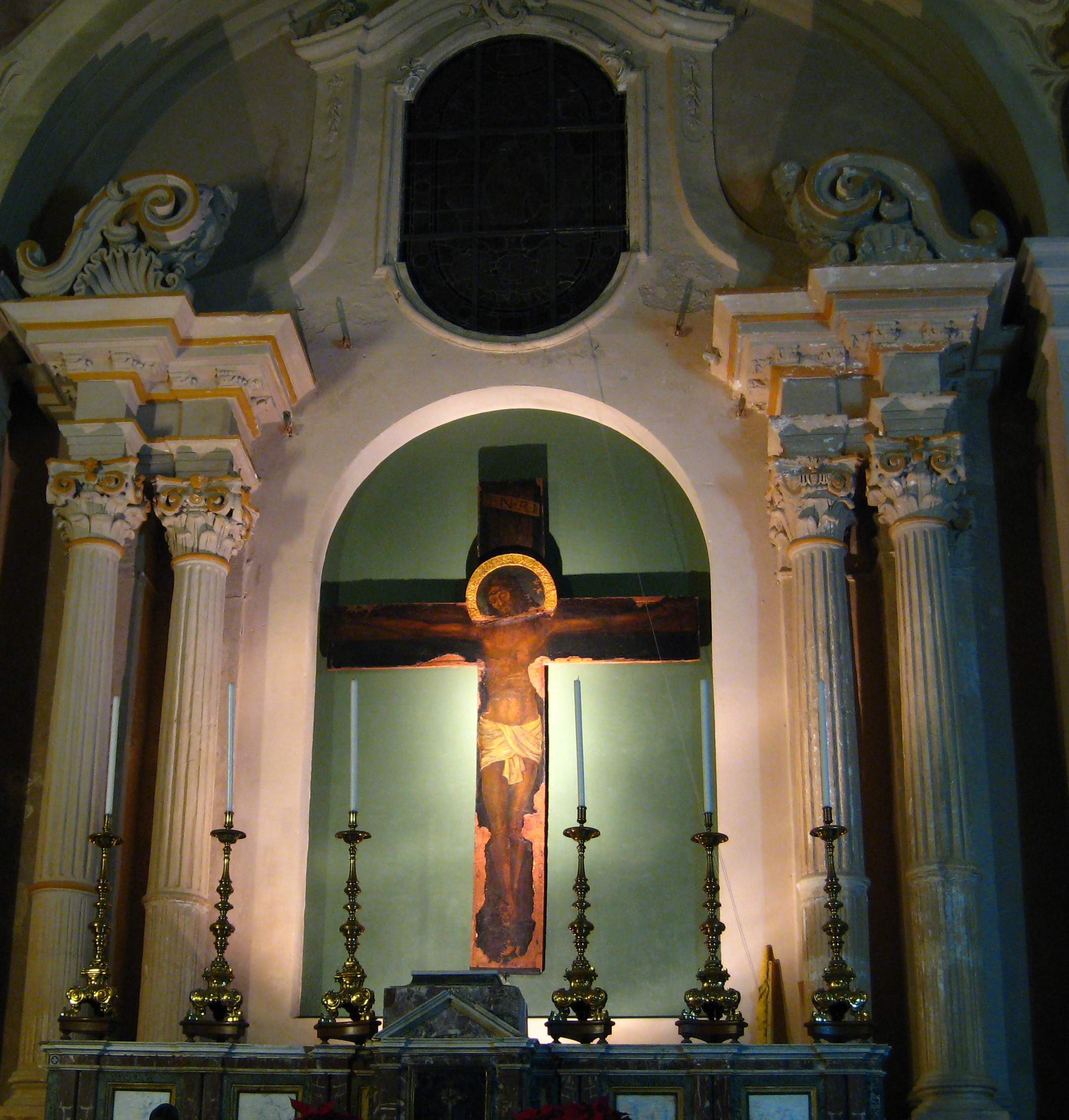 Cappella del Santissimo Crocifisso - Duomo di Siracusa